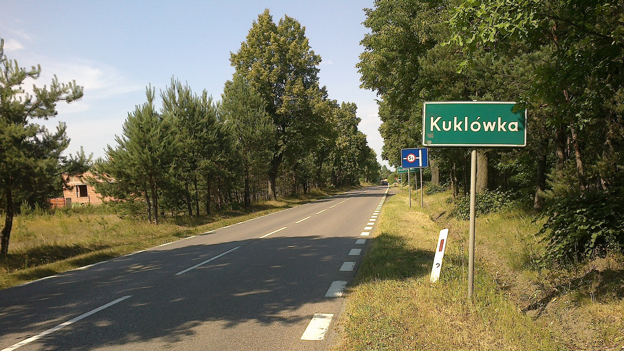 Droga wojewódzka nr 579 w Kuklówce Radziejowickiej